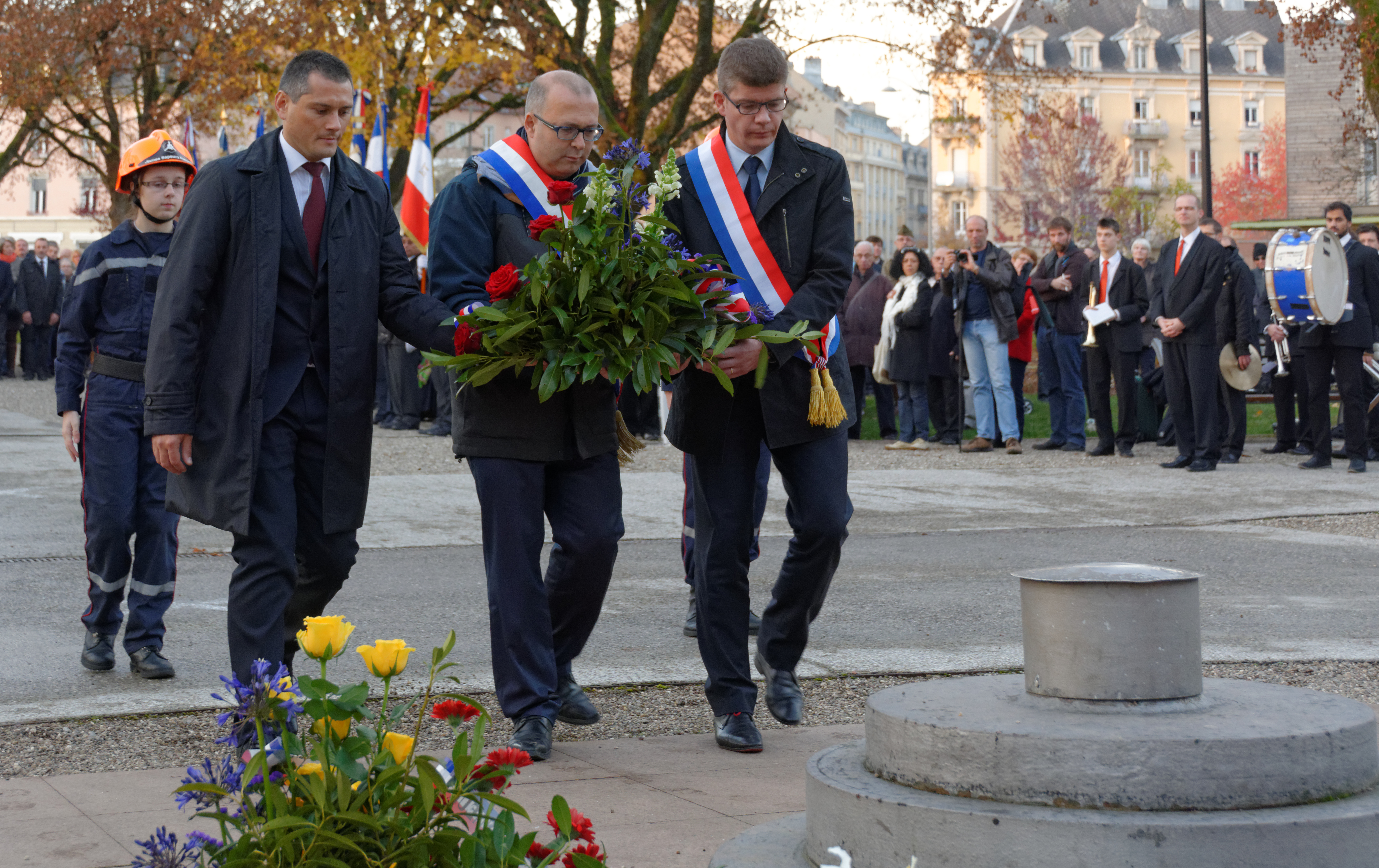 Commémorations organisées à l'occasion du 70e anniversaire de la Libération de Belfort : dépôt de gerbe au square du souvenir, à Belfort : Tony Kneip (conseiller municipal délégué (de Belfort) chargé du monde combattant et de la défense) Damien Meslot (député-maire de Belfort) Cédric Perrin (sénateur-maire de Beaucourt) Personality rights warningAlthough this work is freely licensed or in the public domain, the person(s) shown may have rights that legally restrict certain re-uses unless those depicted consent to such uses. In these cases, a model release or other evidence of consent could protect you from infringement claims.